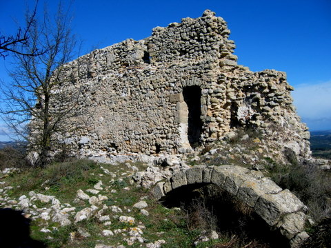 Castell de Queralt a la comarca de l'Anoia - Catalunya